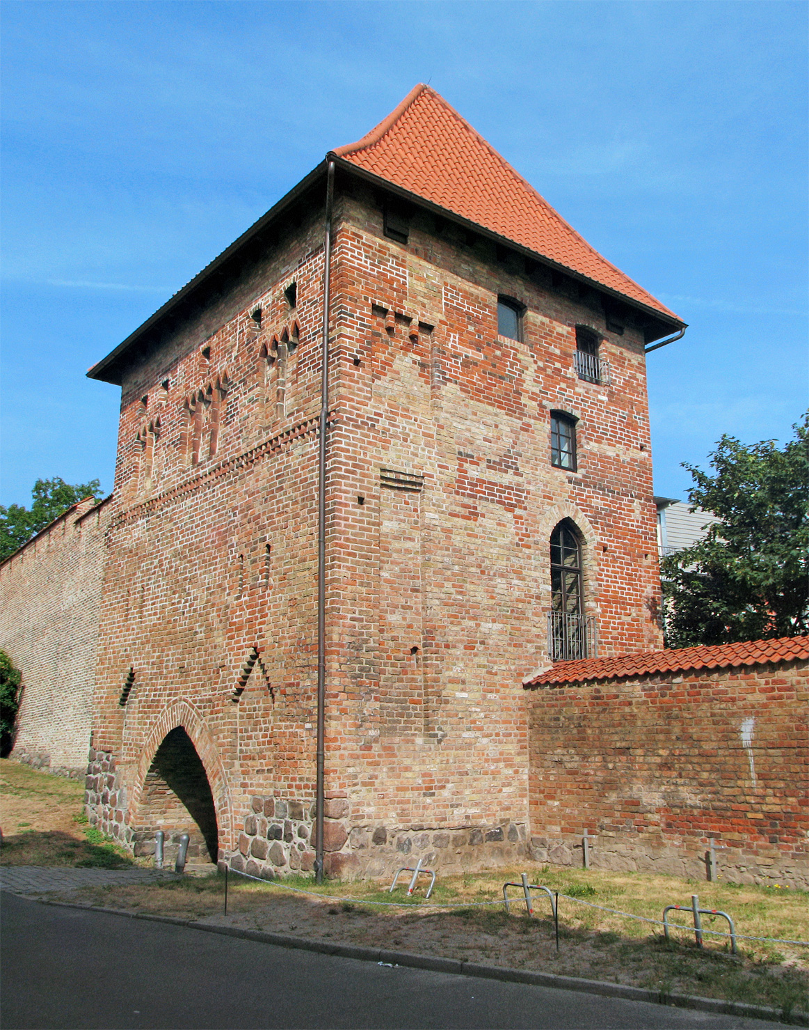 Dieses Bild zeigt das Kuhtor in Rostock. Das nachweislich älteste Stadttor Norddeutschlands.